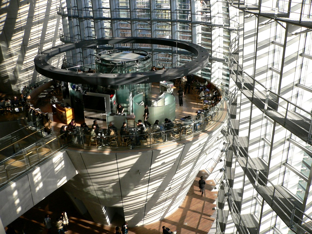 巨大な逆円錐の最上部に広がる、円形（ロンド：仏語）の洗練された空間。